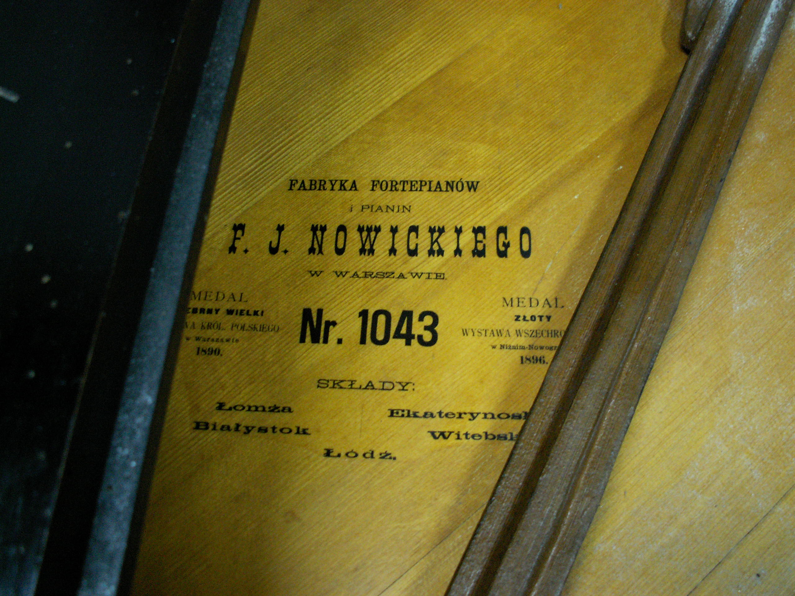 Wnętrze pianina marki Nowicki